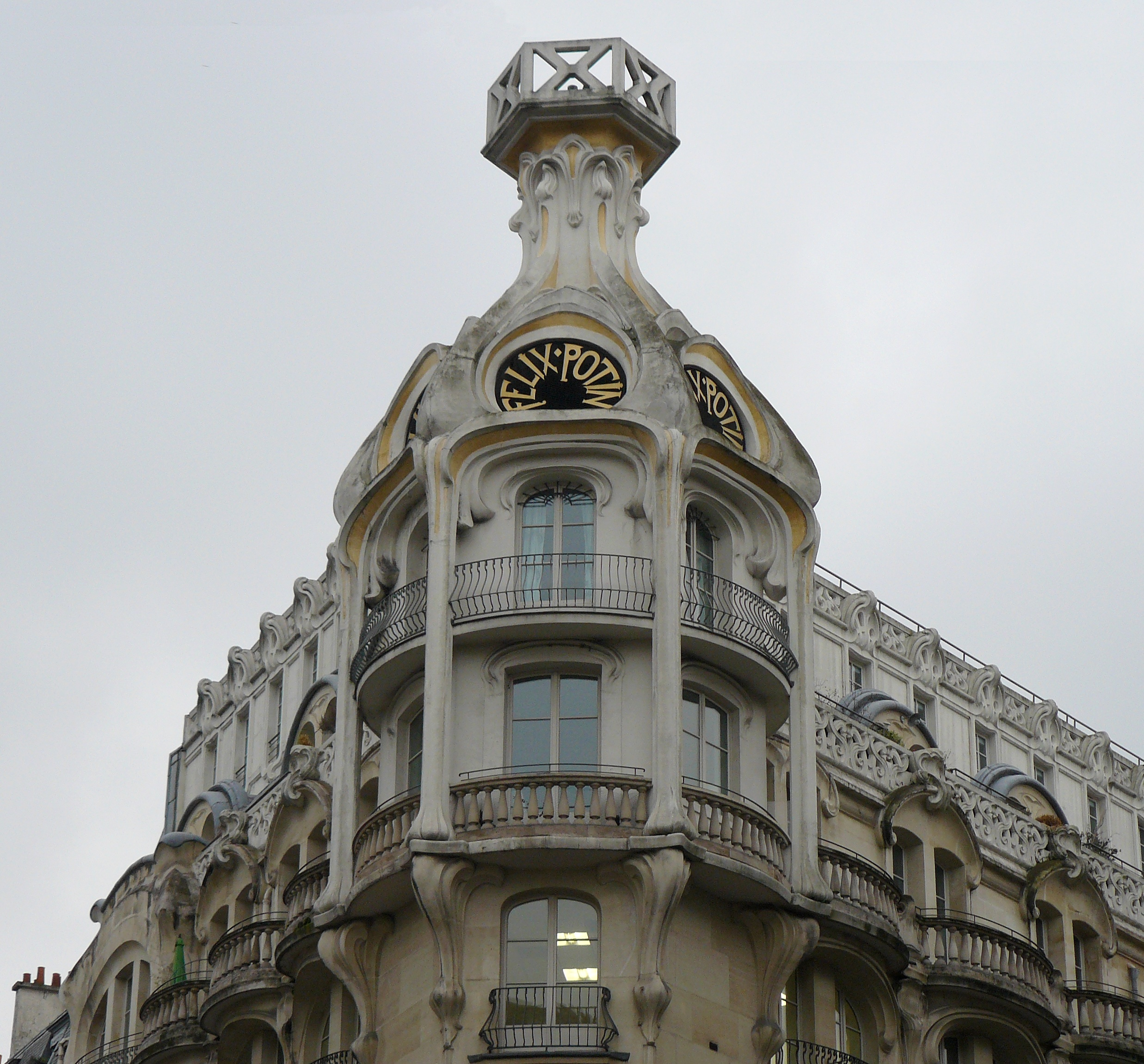 Bâtiment de Félix Potin, rue de Rennes, à Paris (6e arrond.) construit en 1904 par l'architecte Paul Auscher (1866-1932) - Style Art Nouveau